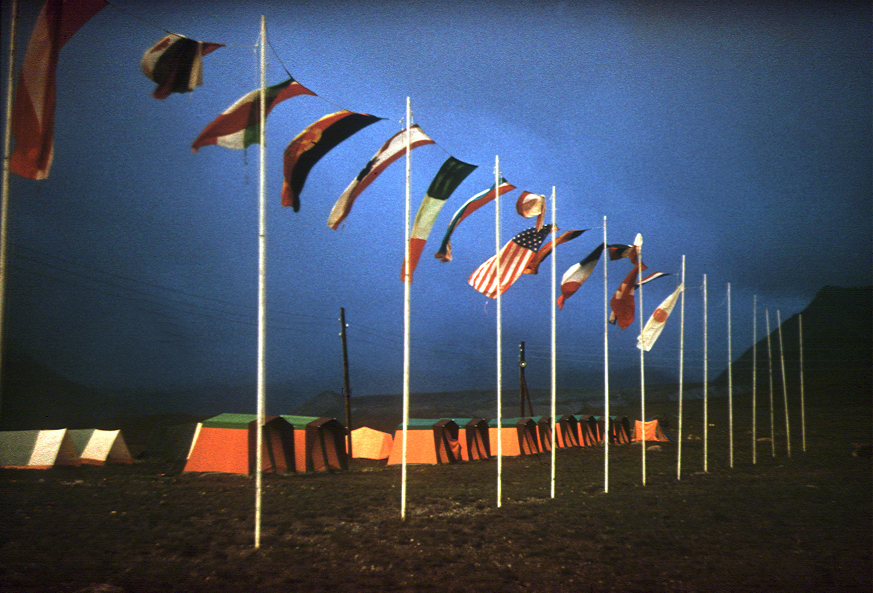 Rahvusvaheline alpilaager Pamir öös 84